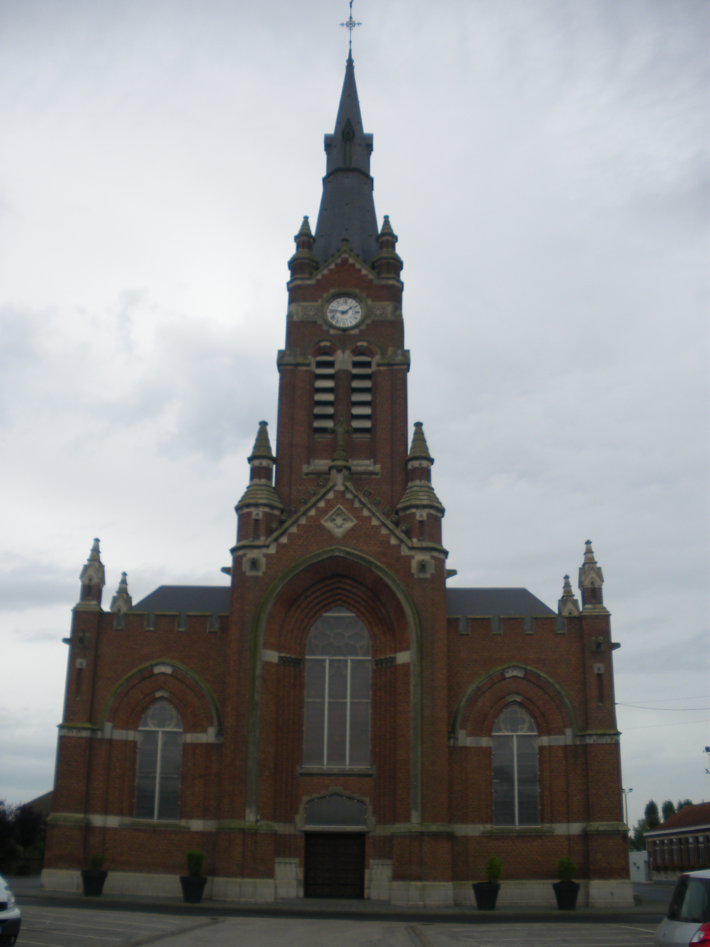 Vue de l'église Saint-Barthélémy de Vieux-Berquin.